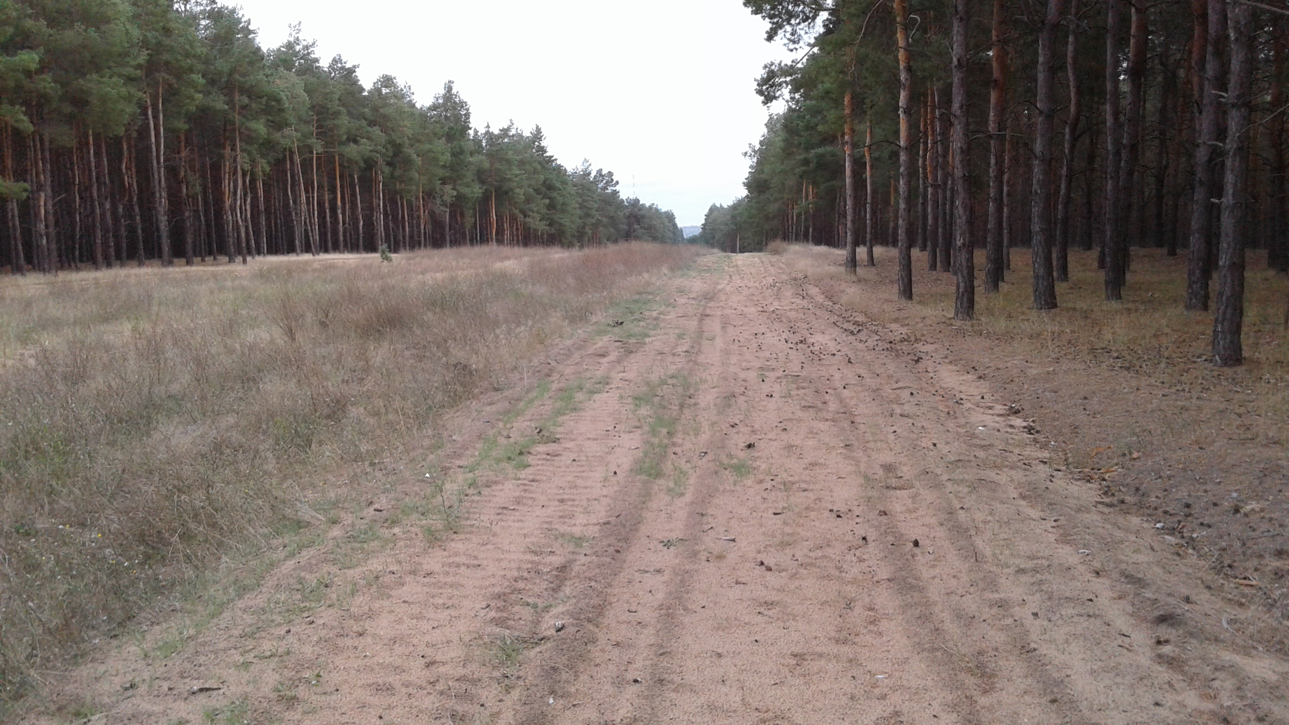 Баловно-Матвіївське урочище